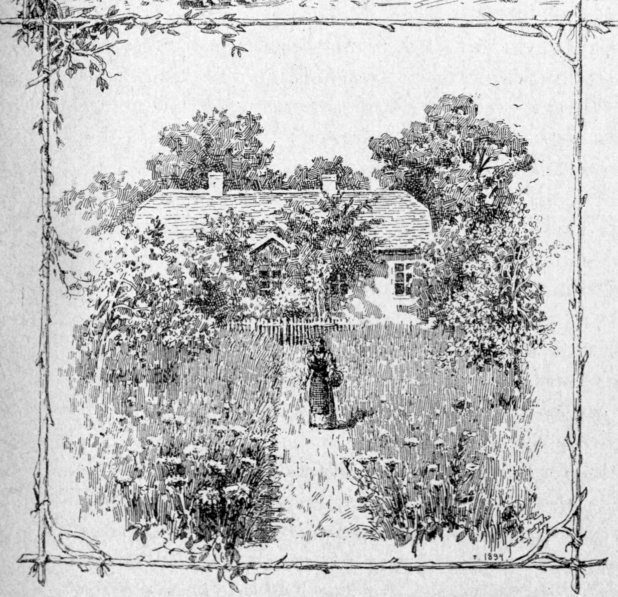 Беларуская (тарашкевіца): Кушляны (Kušlany), сядзіба Ясевічаў (Jasievič)